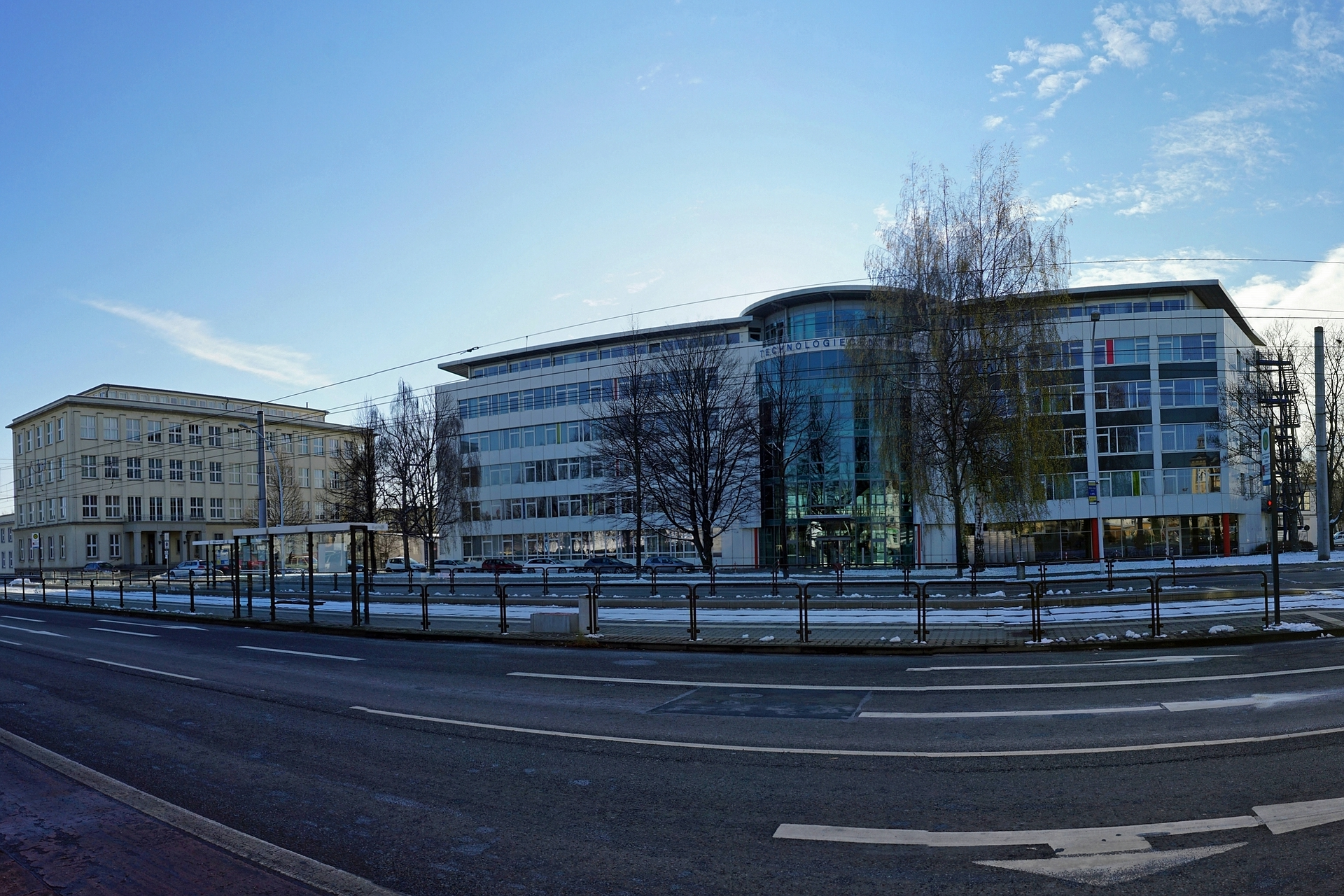 Das Technologie Centrum Chemnitz an der Annaberger Straße, 2015